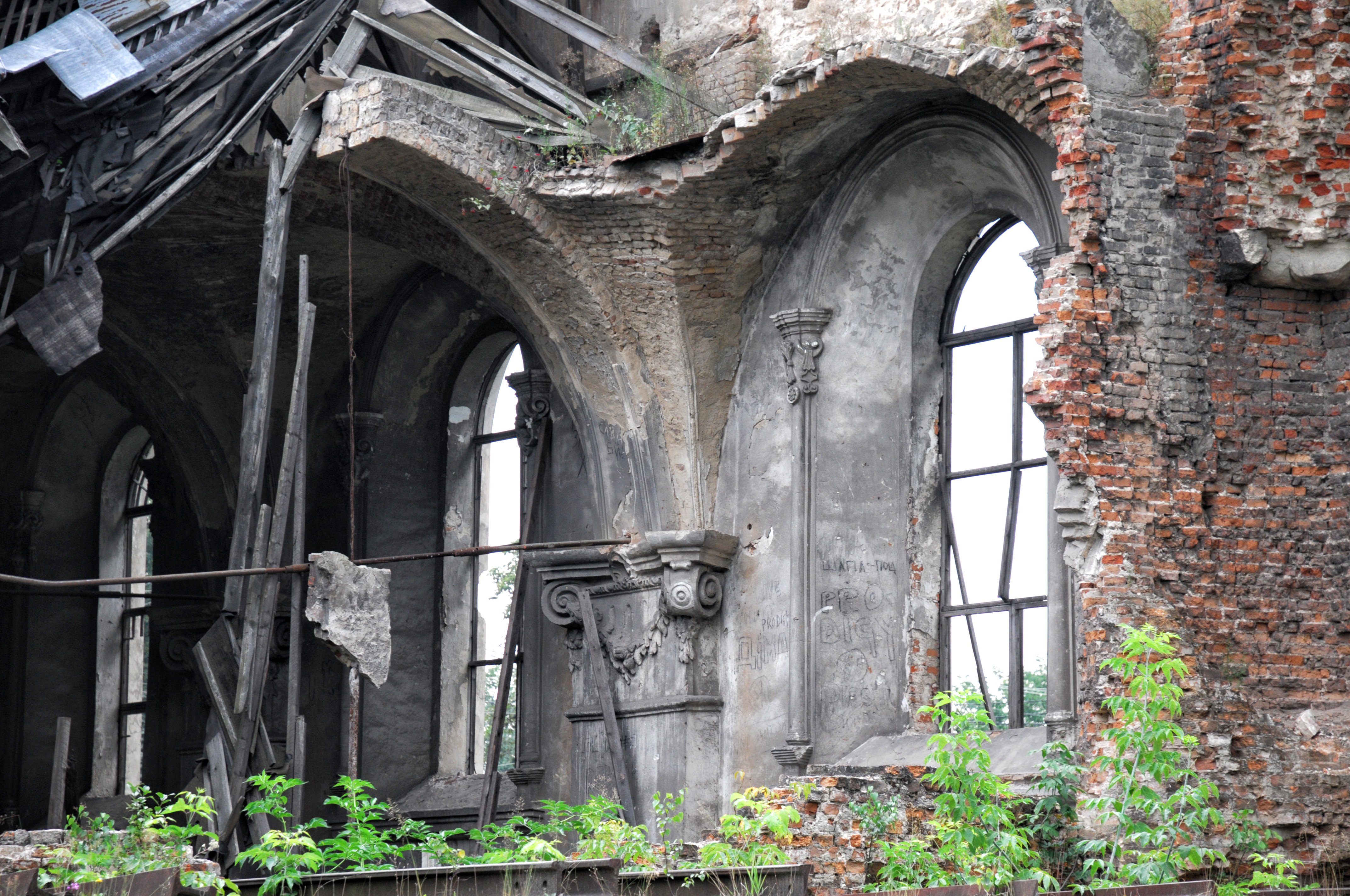 Бродівська синагога